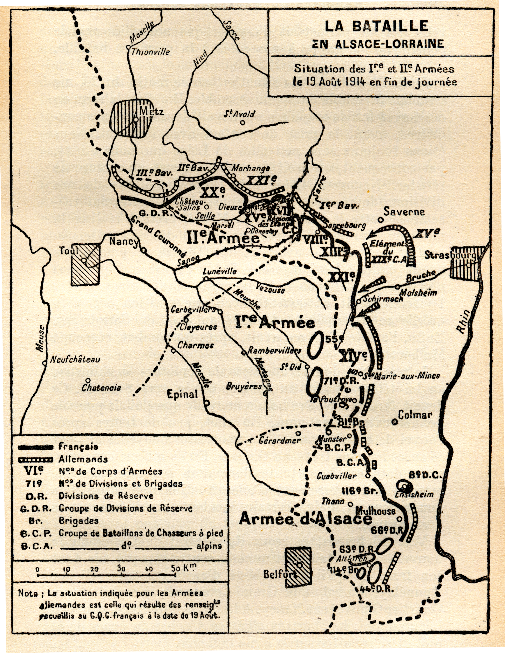 Cartes de la bataille d’Alsace et de Lorraine, au début de la guerre (première libération), pendant la Première Guerre mondiale, d’après les informations du GQG français (pas forcément exactement la réalité donc, surtout en ce qui concerne les armées allemandes). Tirées des mémoires du maréchal Joffre, publiées à titre posthume. Référence complète : Joseph Joffre, Mémoires du Maréchal Joffre (1910-1917), tome premier, Paris : Librairie Plon, 1932